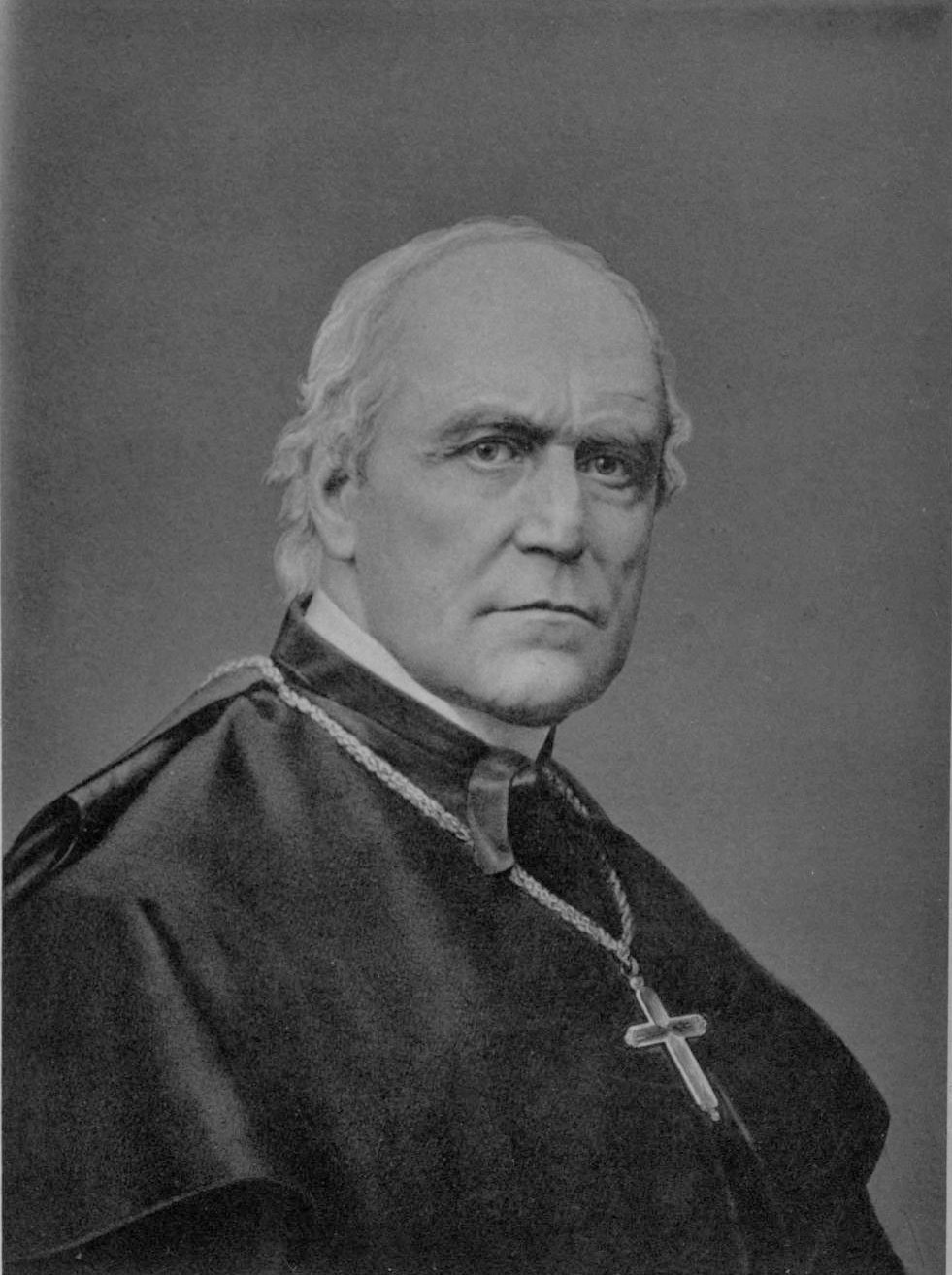 Wilhelm Emanuel Freiherr von Ketteler, Bischof von Mainz